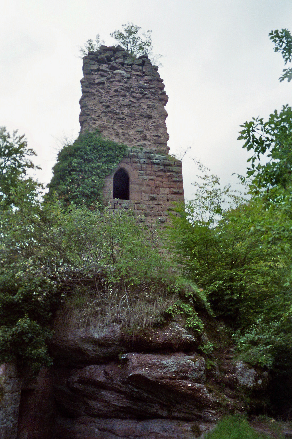 Château du Griffon ou du Greifenstein, aux environs de Saverne, Bas-Rhin, France.